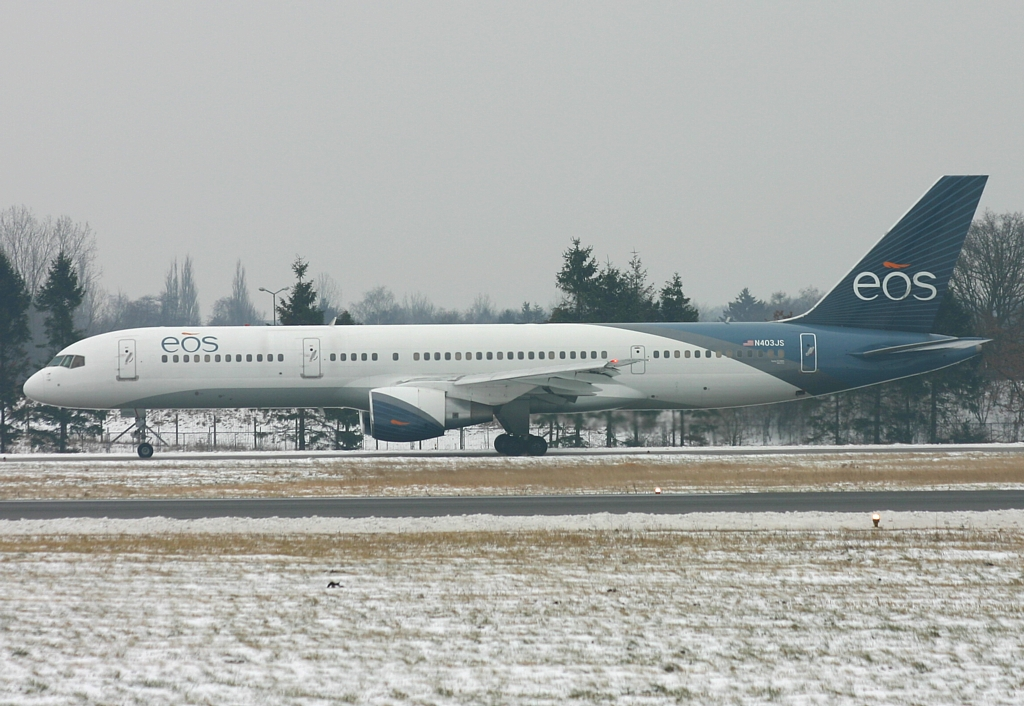 Eos Airlines Boeing 757-200 N403JS